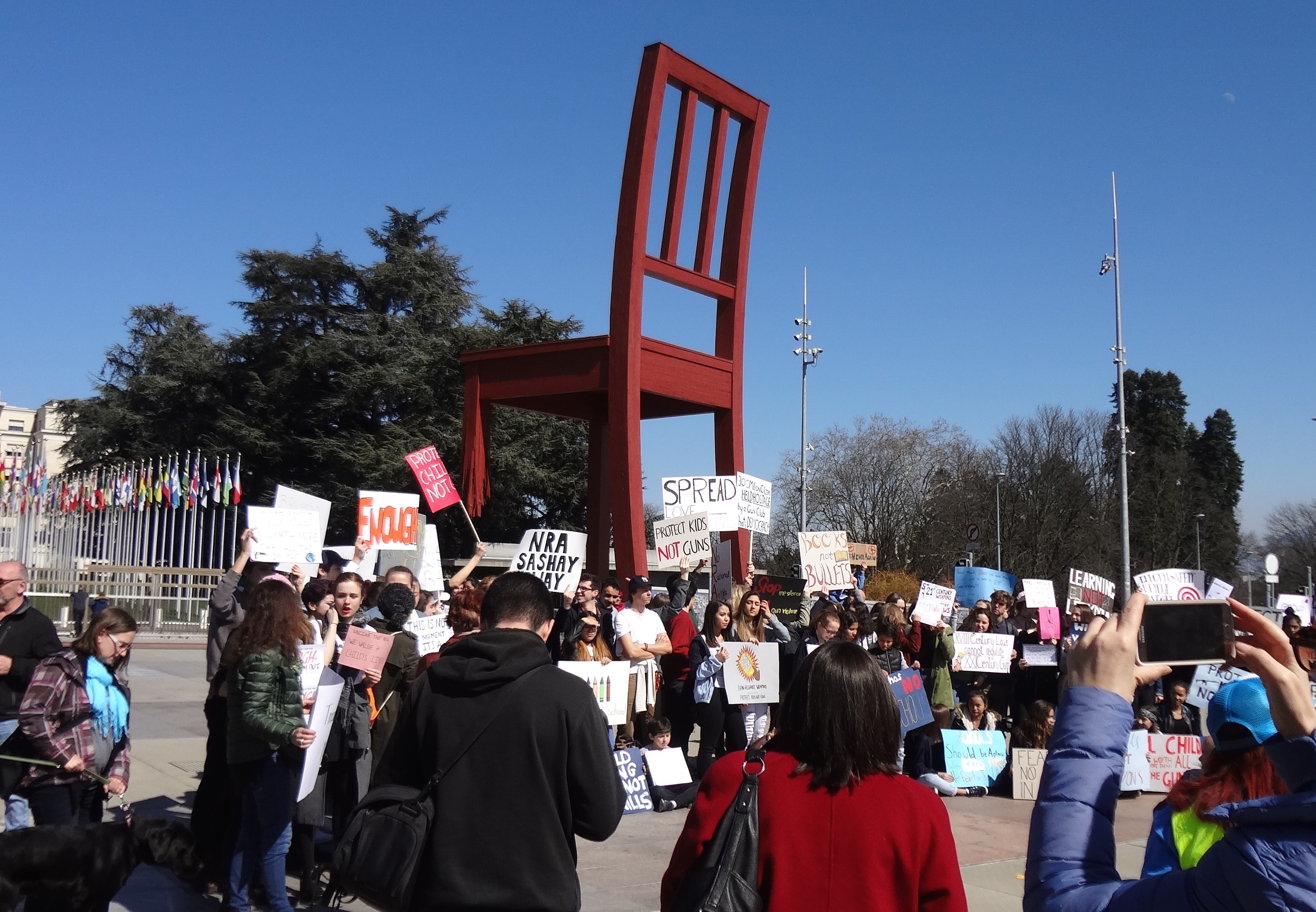 Manifestation pour un meilleur contrôle des armes aux États-Unis, campagne « March For Our Lives » à la suite d'une tuerie dans une école à Parkland en Floride le 14 février 2018. Manifestation de soutien à Genève, place des Nations. Vues de groupe.